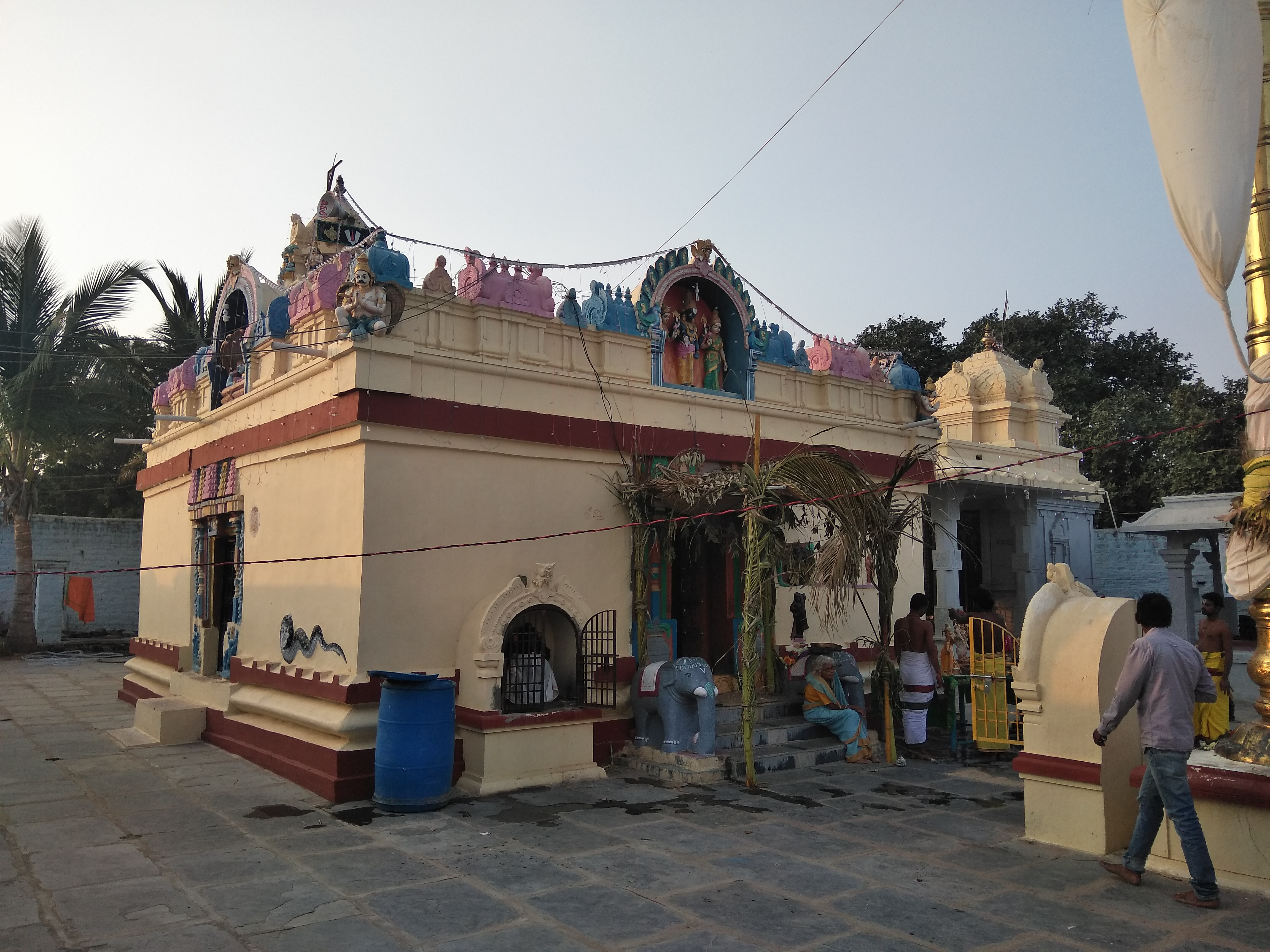 శ్రీవేణుగోపాలస్వామి ఆలయం, పెద్దదిన్నె